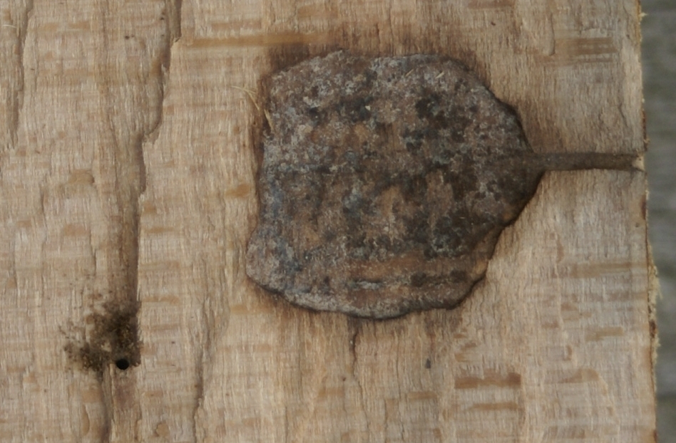 Xyleborus_dryographus_Fraßbild 1